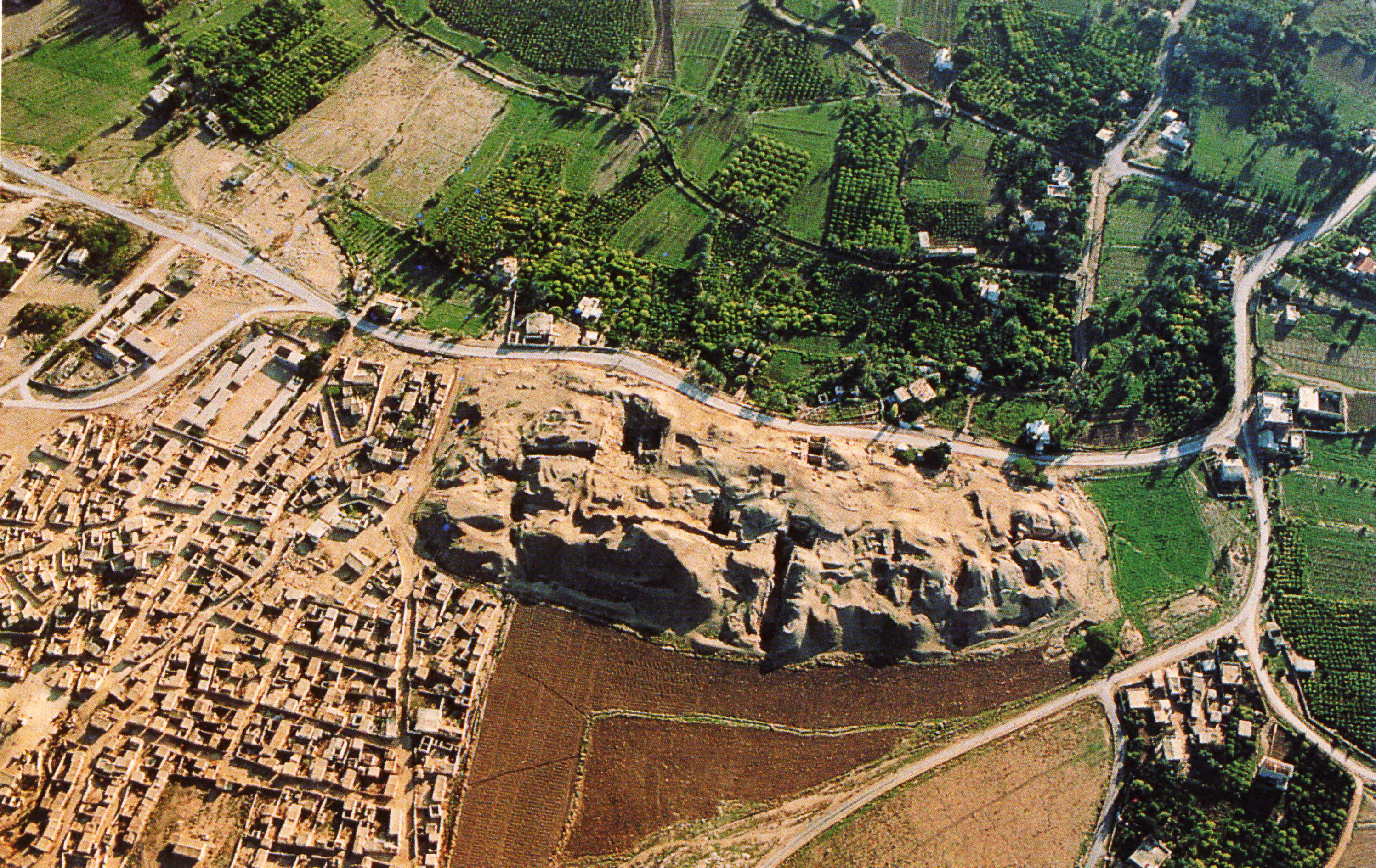 veduta aerea dell'area archeologica di Gerico